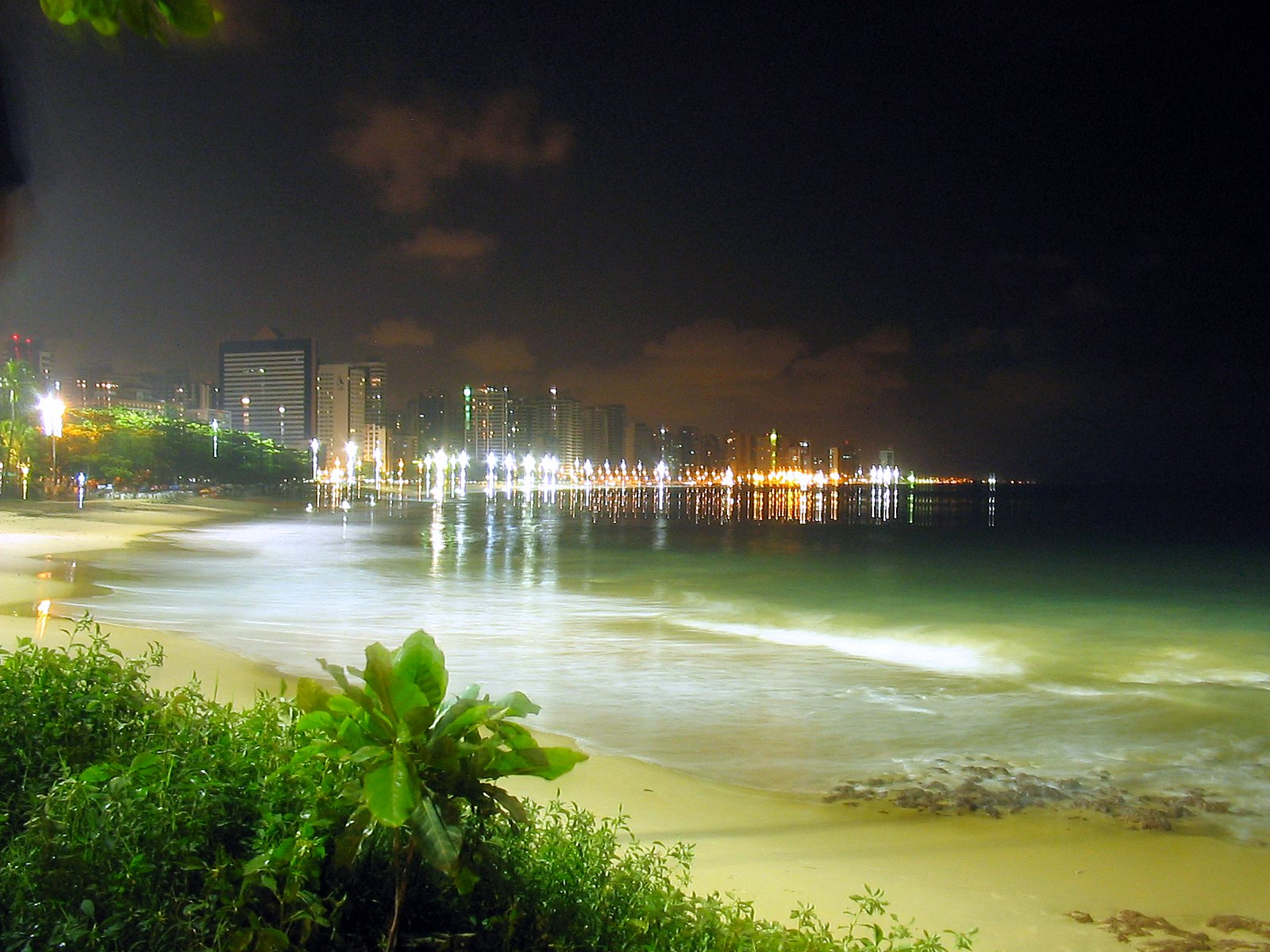 Vista noturna da praia do Nautico